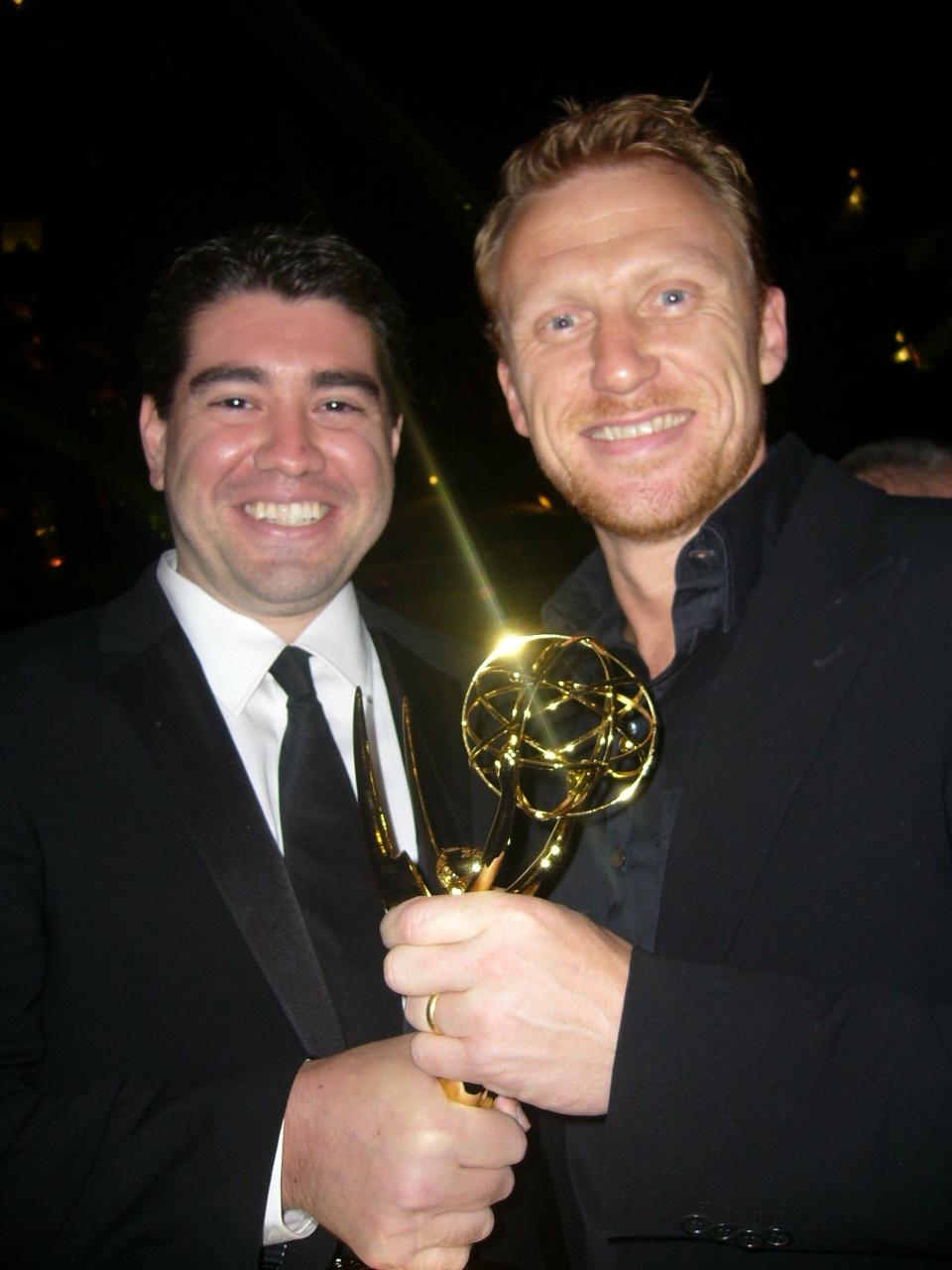 Kevin McKidd (right)